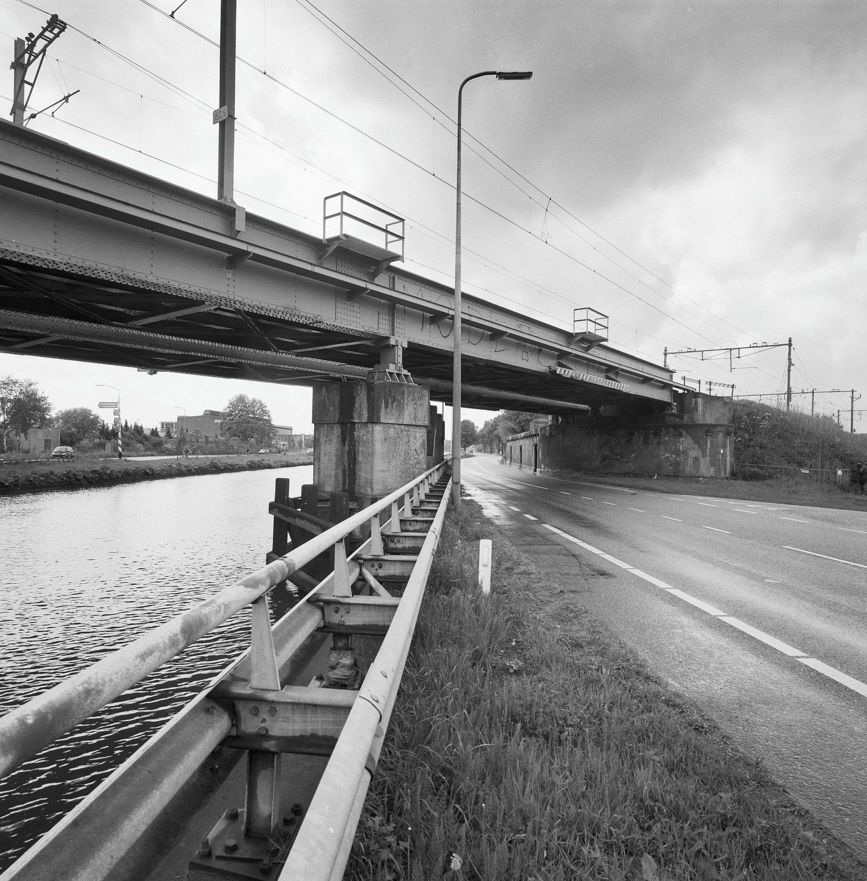 Spoorbrug bij Weert: Overzicht spoor